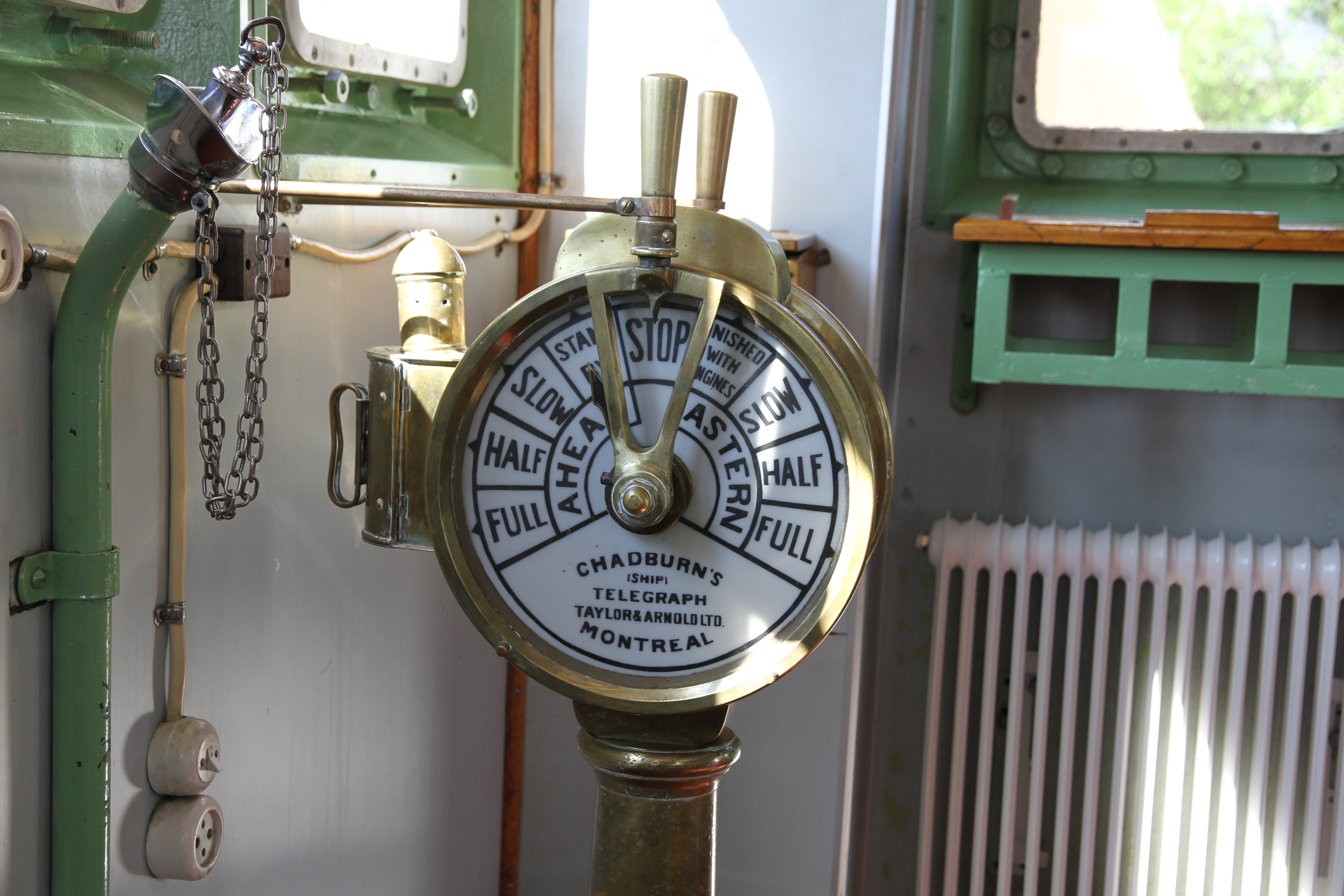 Maskintelegrafen i styrhytten på Fyrskeppet Finngrundet vid Wasamuseet, Stockholm 11 juli 2015